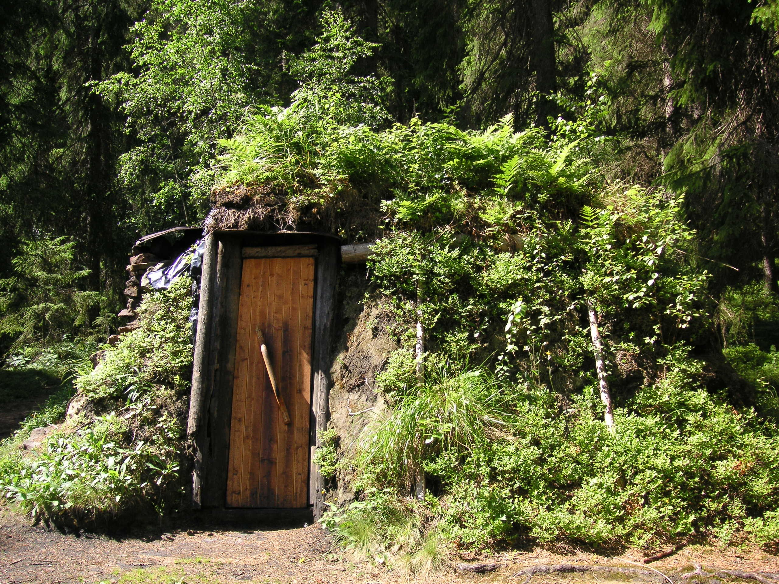 Kolarkoja vid Jätturn i Dalarna